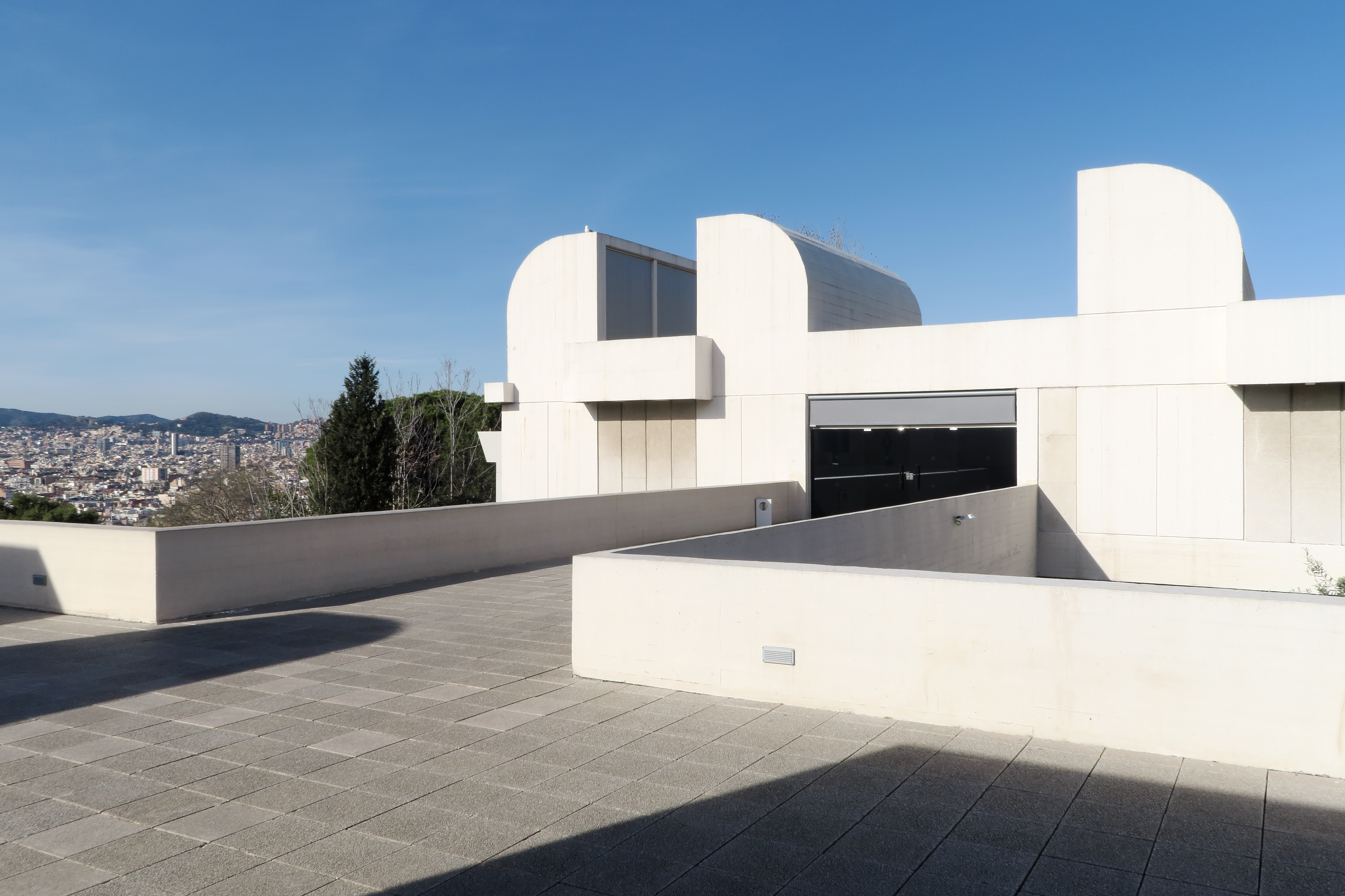 Vue depuis la terrasse de la fondation Joan-Miró (mars 2017).